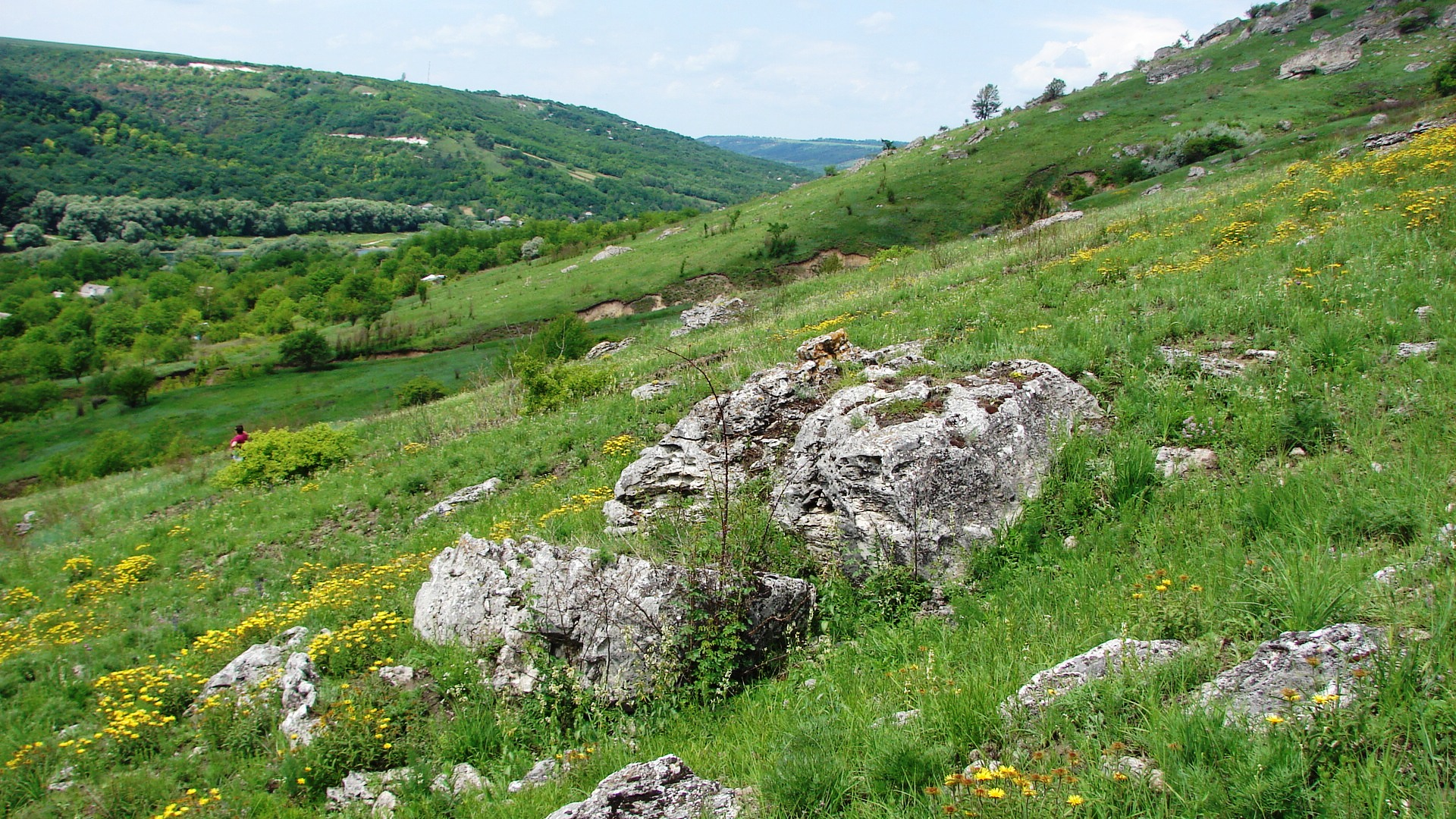 Регіональний ландшафтний парк «Дністер», Могилів-Подільський, Ямпільський р-н.